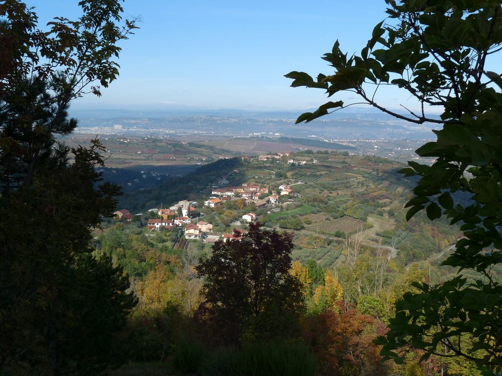 Čentur